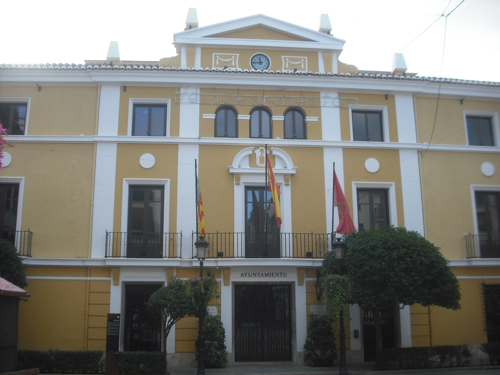 Ajuntament de Sogorb.